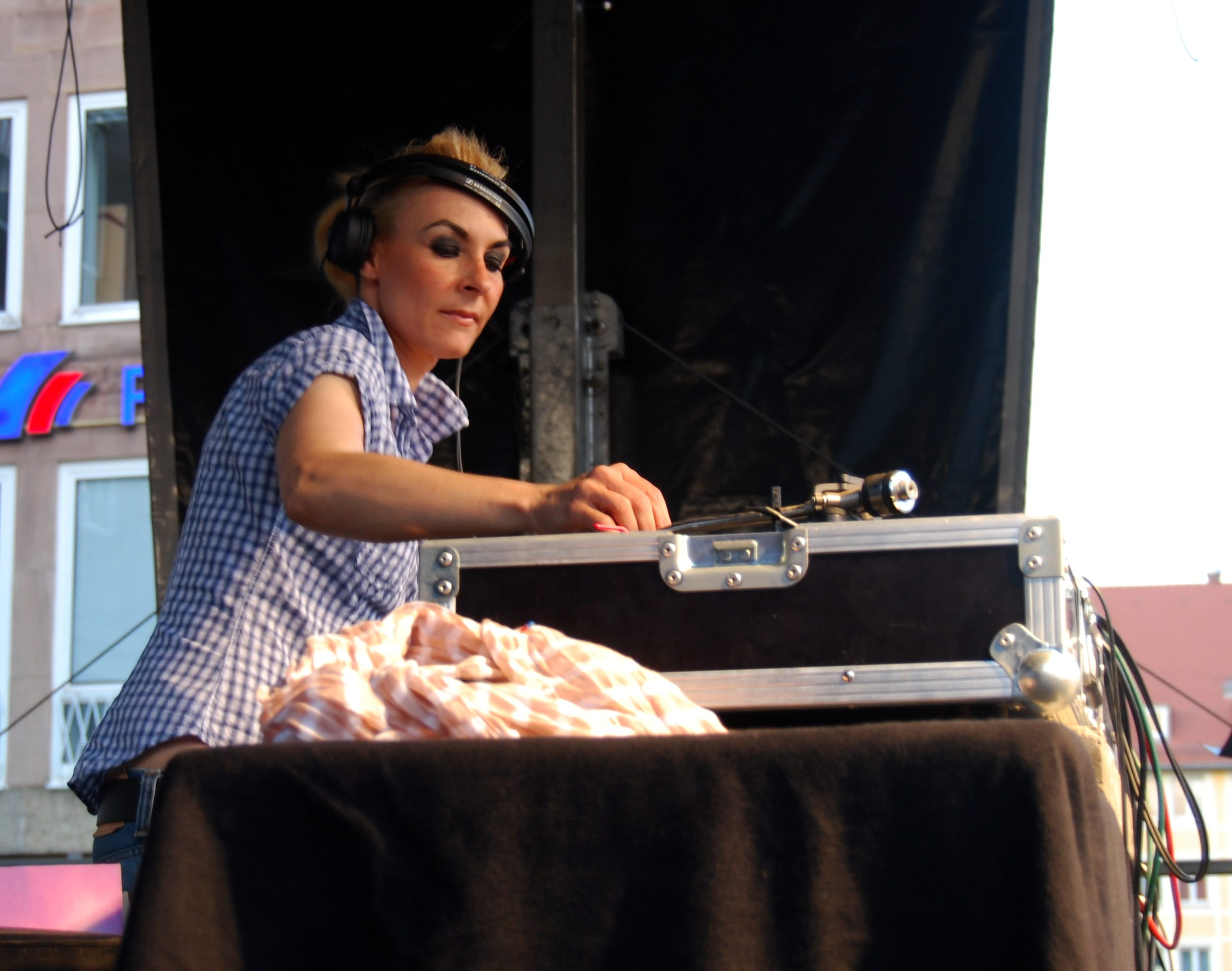 Marusha am Nürnberger Hauptmarkt. Veranstaltung zum Erhalt des Z-Baus.